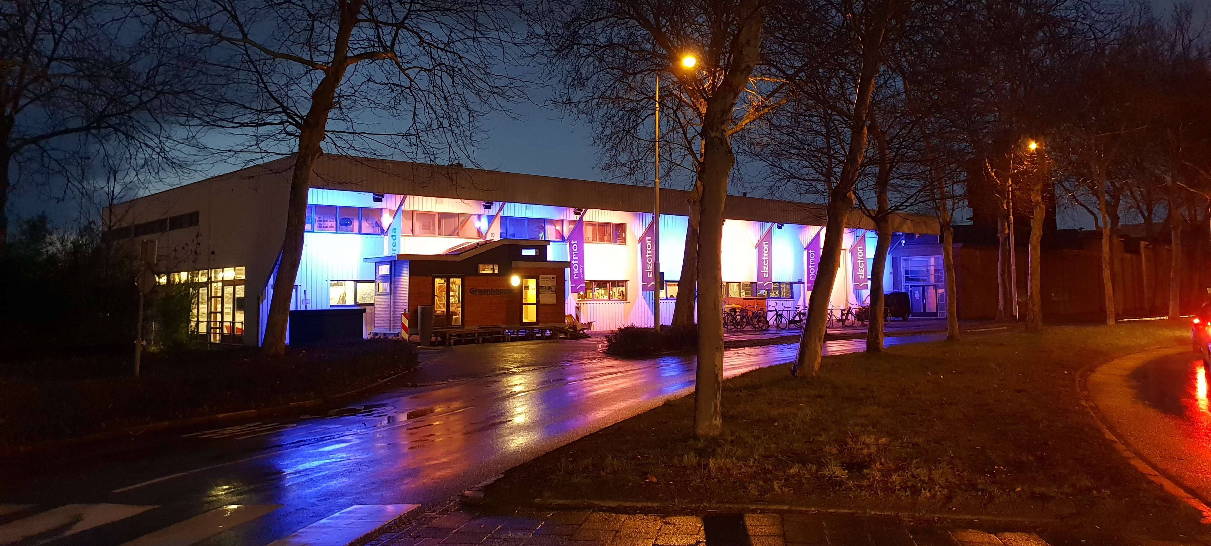 Zicht op een deel van de Kunstreactor Electron, gevel Belcrumweg zijde